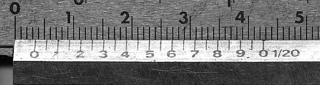 Nonius uit schuifmaat; eigen foto